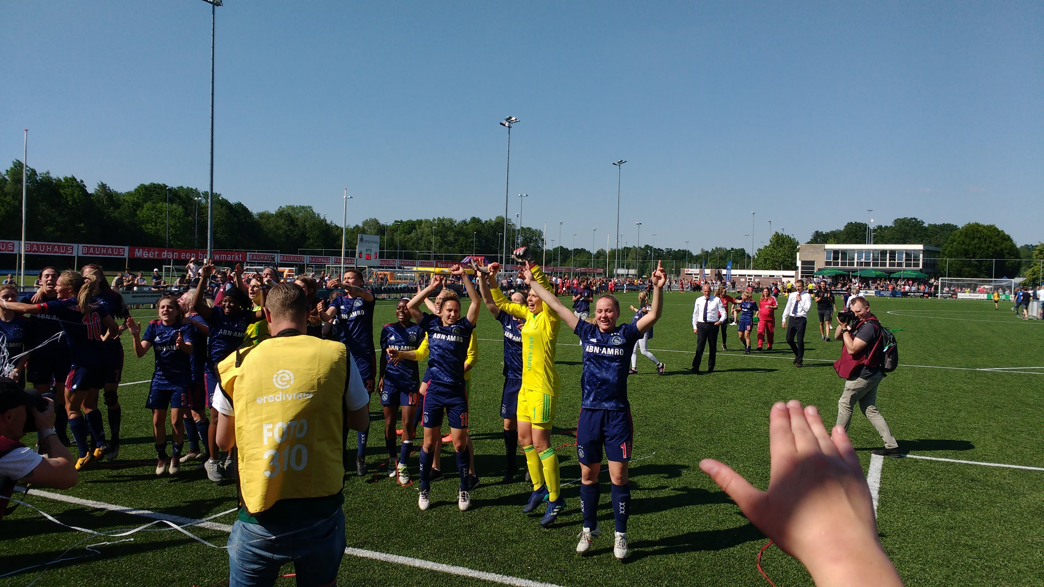 Ajax Vrouwen, direct na de gewonnen wedstrijd tegen fc Twente Vrouwen, waardoor ze kampioen werden en het meegereisde publiek kwamen bedanken.